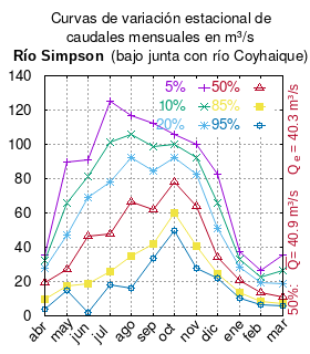 Curvas de variación estacional del río Simpson bajo junta con el río Coyhaique. # Dirección General de Aguas # Diagnóstico y clasificación de los cursos y cuerpos de agua según objetivos de calidad. Cuenca del río Aysén. # Santiago de Chile # Ministerio de Obras Públicas (Chile) # 2004 # url: # urlarchivo: # Tabla 4.9: Estación Simpson bajo junta con Coyhaique, pág. 57 mes 5% 10% 20% 50% 85% 95% abr 35.64 32.11 27.84 19.67 9.62 3.71 may 89.80 66.08 46.81 26.99 17.30 14.87 jun 90.82 81.02 69.15 46.47 18.52 2.11 jul 125.16 101.15 78.14 47.72 25.99 18.19 ago 116.63 105.56 92.14 66.51 34.93 16.38 sep 112.58 98.91 84.47 62.20 42.23 33.39 oct 105.89 99.68 92.15 77.76 60.04 49.63 nov 100.05 92.03 82.31 63.74 40.87 27.43 dic 82.76 65.70 50.92 34.18 24.69 21.95 ene 37.26 33.16 28.55 20.92 13.55 10.19 feb 26.27 22.76 19.10 13.57 8.66 6.44 mar 35.68 26.33 18.71 10.84 6.96 5.98 This plot was created with Gnuplot.